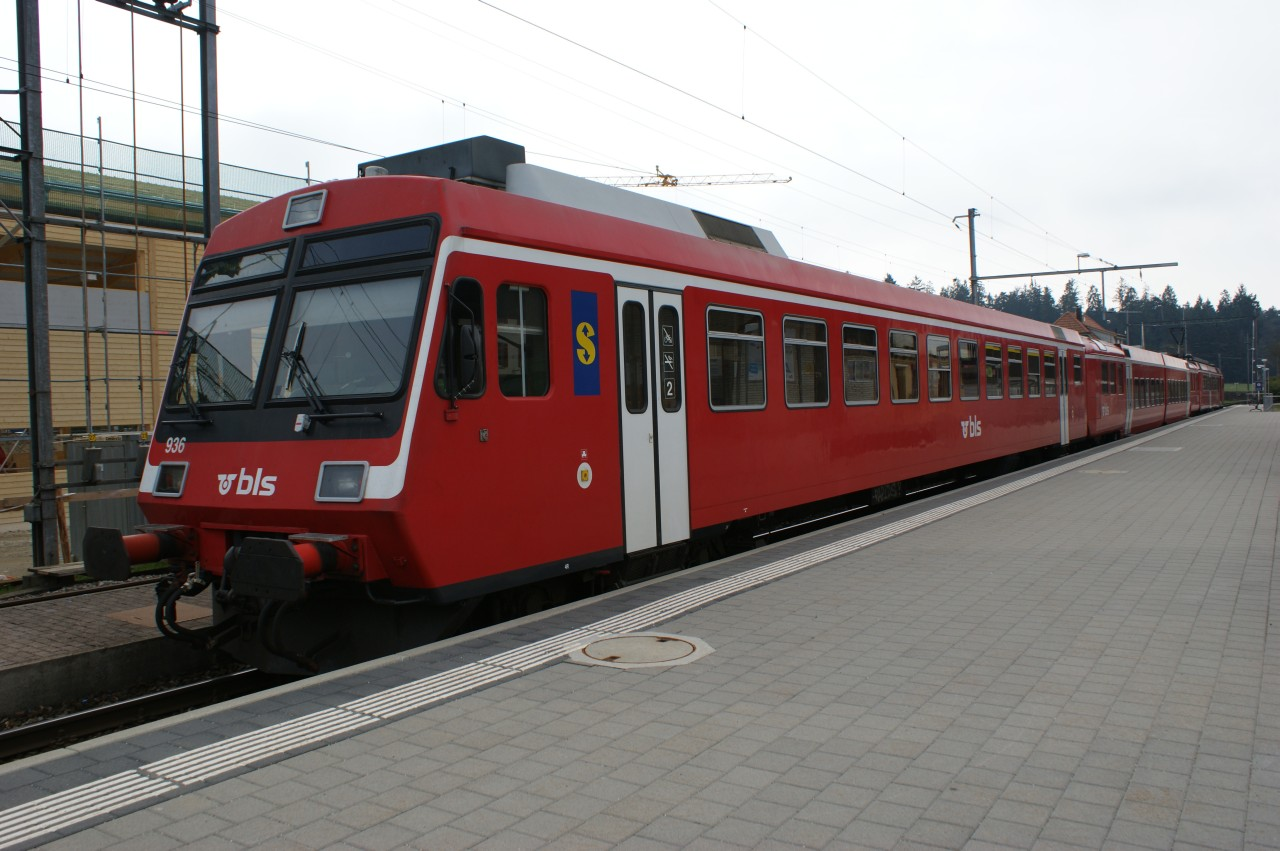 Bahnhof Affoltern-Weier im letzten Betriebsjahr der S4, ab Dezember 2009 fuhren hier nur noch Busse